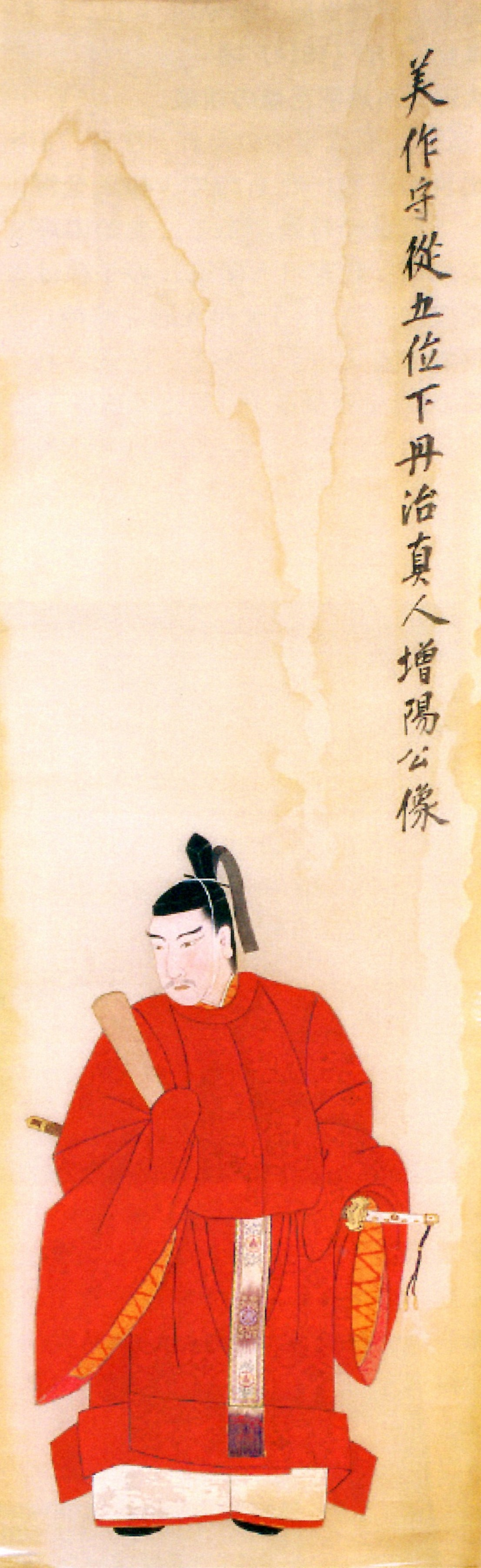 大関増陽の肖像。